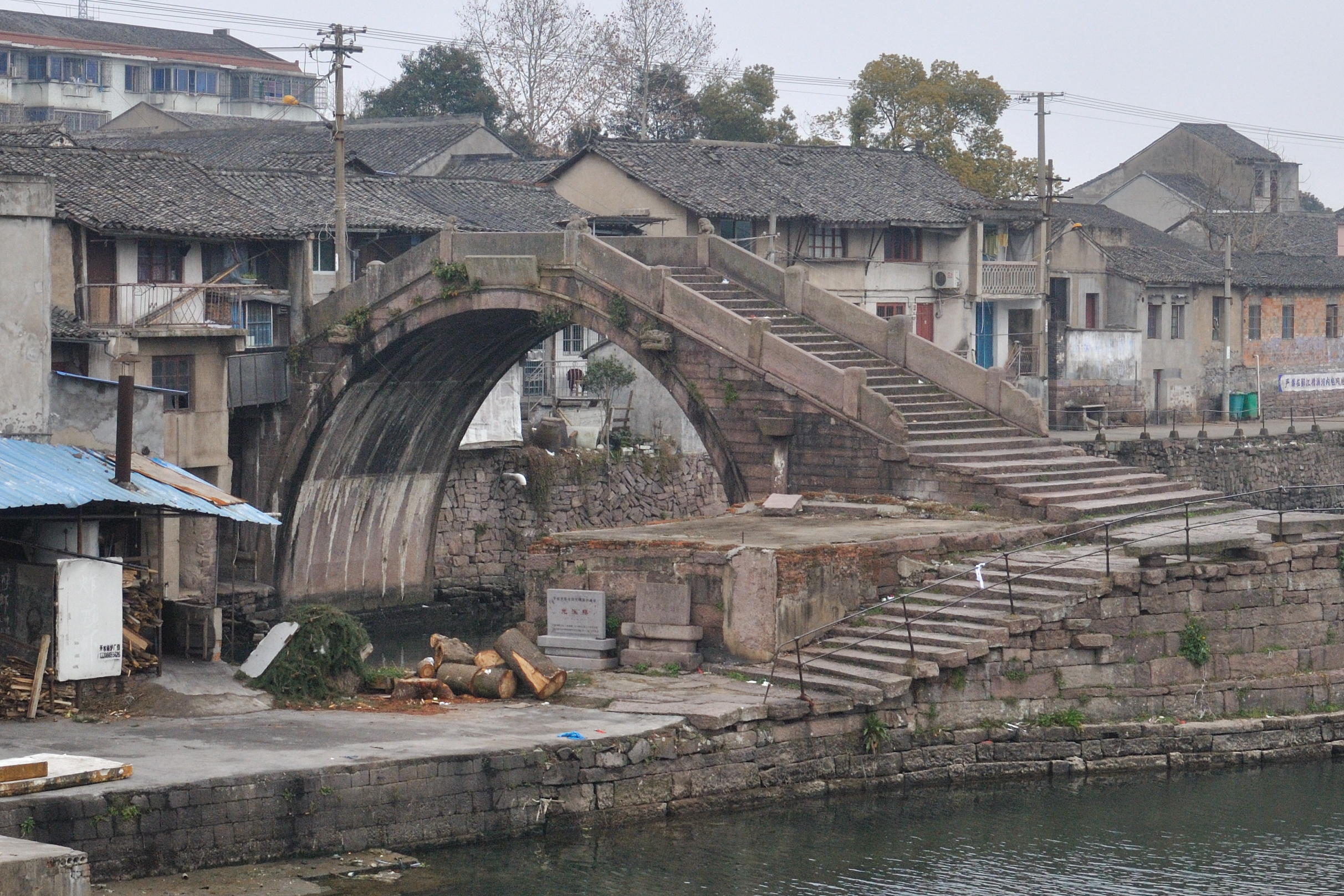 光溪桥，位于宁波市鄞州区鄞江镇